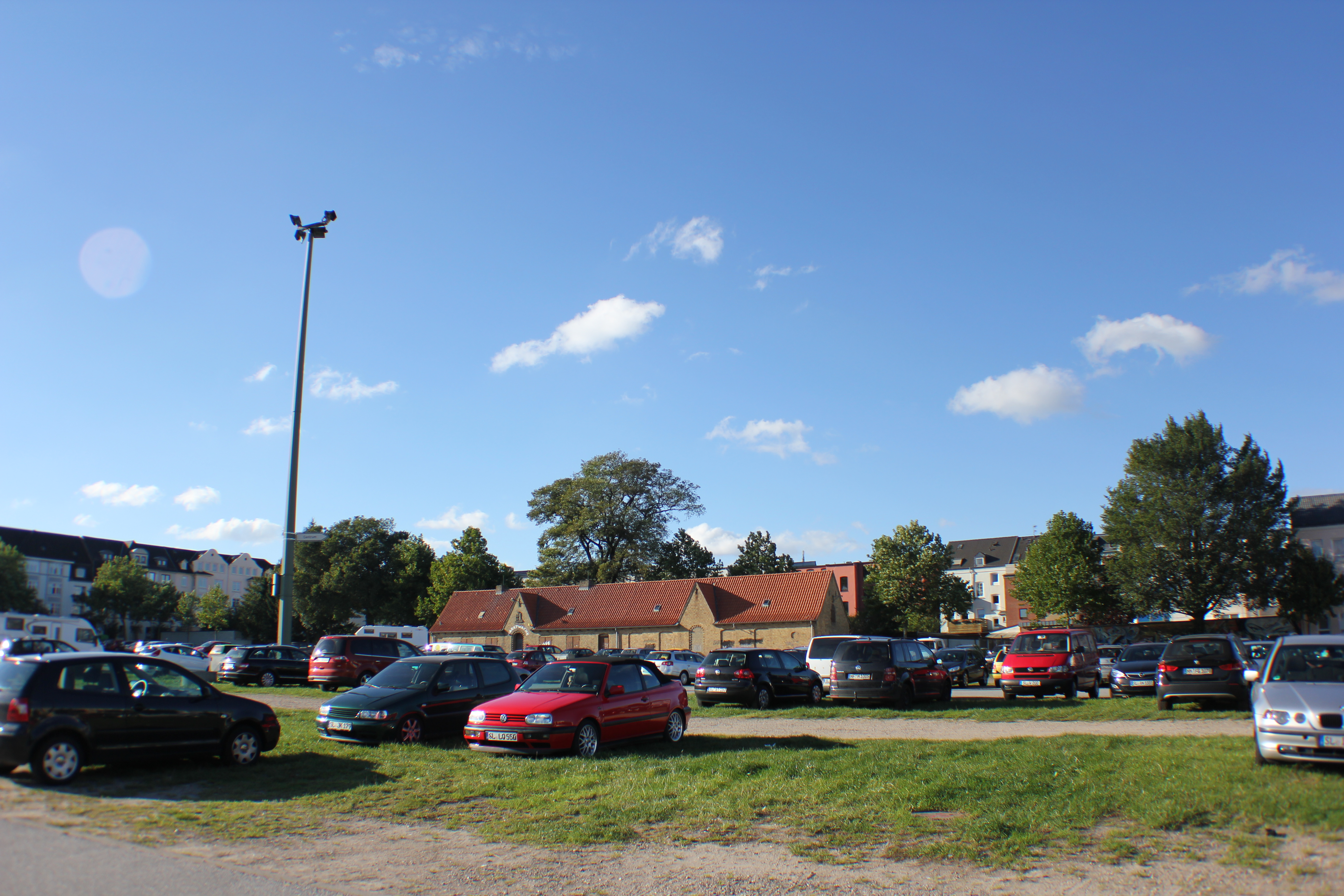 Exe, Flensburg, der hohe Lampenmast und Marktwache, Bild 05